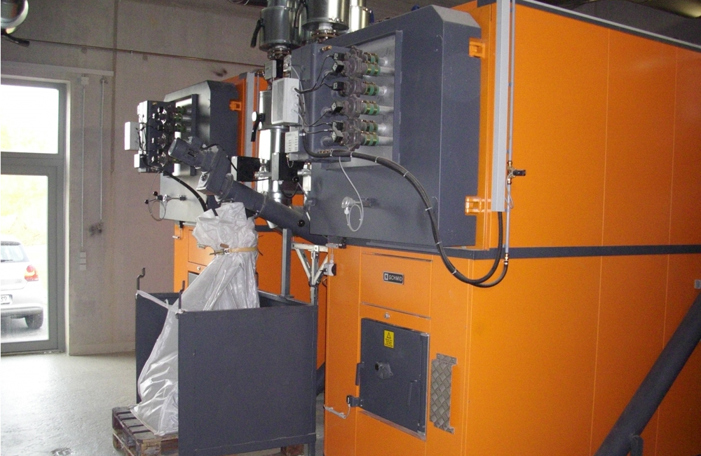 Hackschnitzelkessel (450 kW therm.) der Firma Schmid in der Heizzentrale Lautenbach, Herdwangen-Schönach